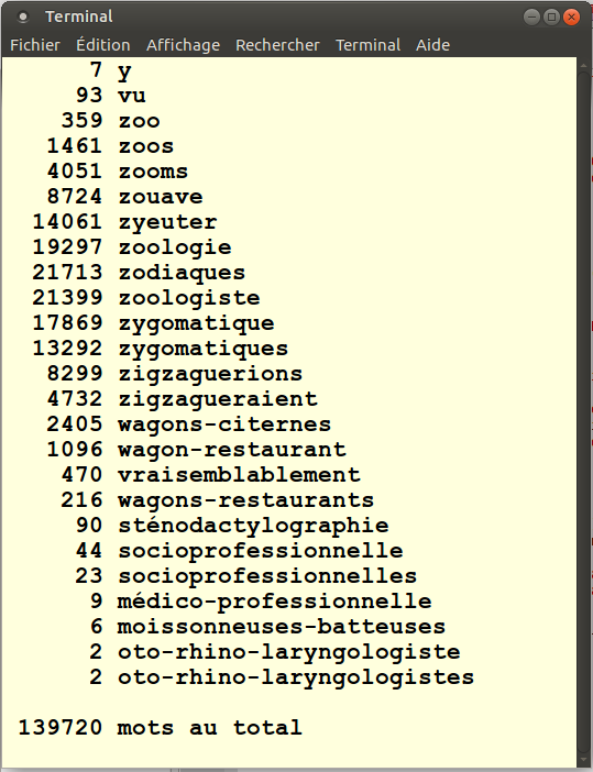 Correction du fichier Curses qui avait une petite erreur due au fait que le nombre d'octets en unicode n'est pas le nombre de glyphes